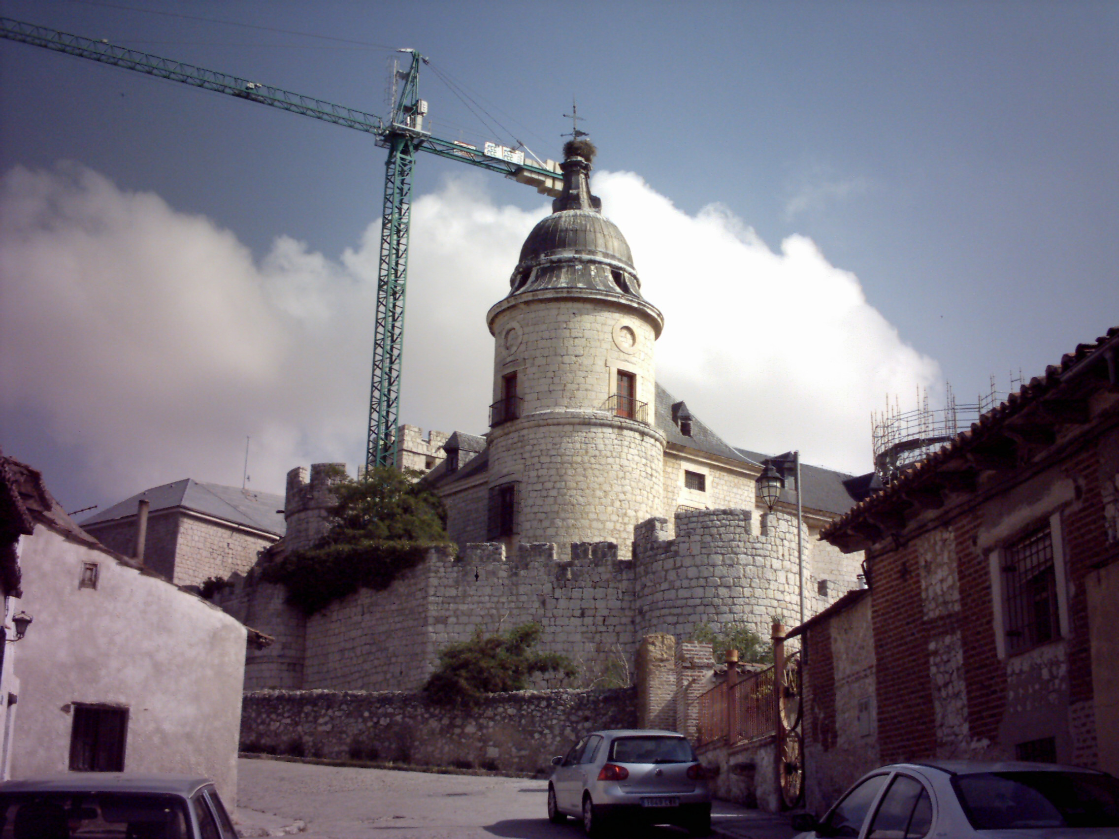 Archivo General de Simancas